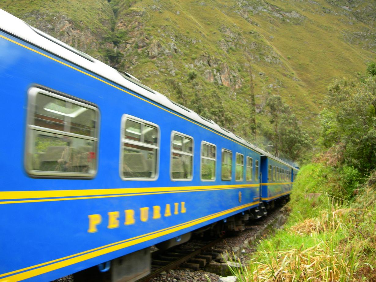 Tren de Peru Rail yendo de Cuzco hacia Machu Picchu.